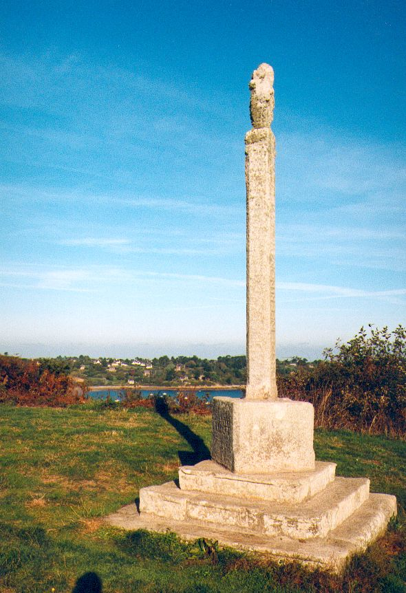 La Croix de Veuves, à Ploubazlanec près de Paimpol